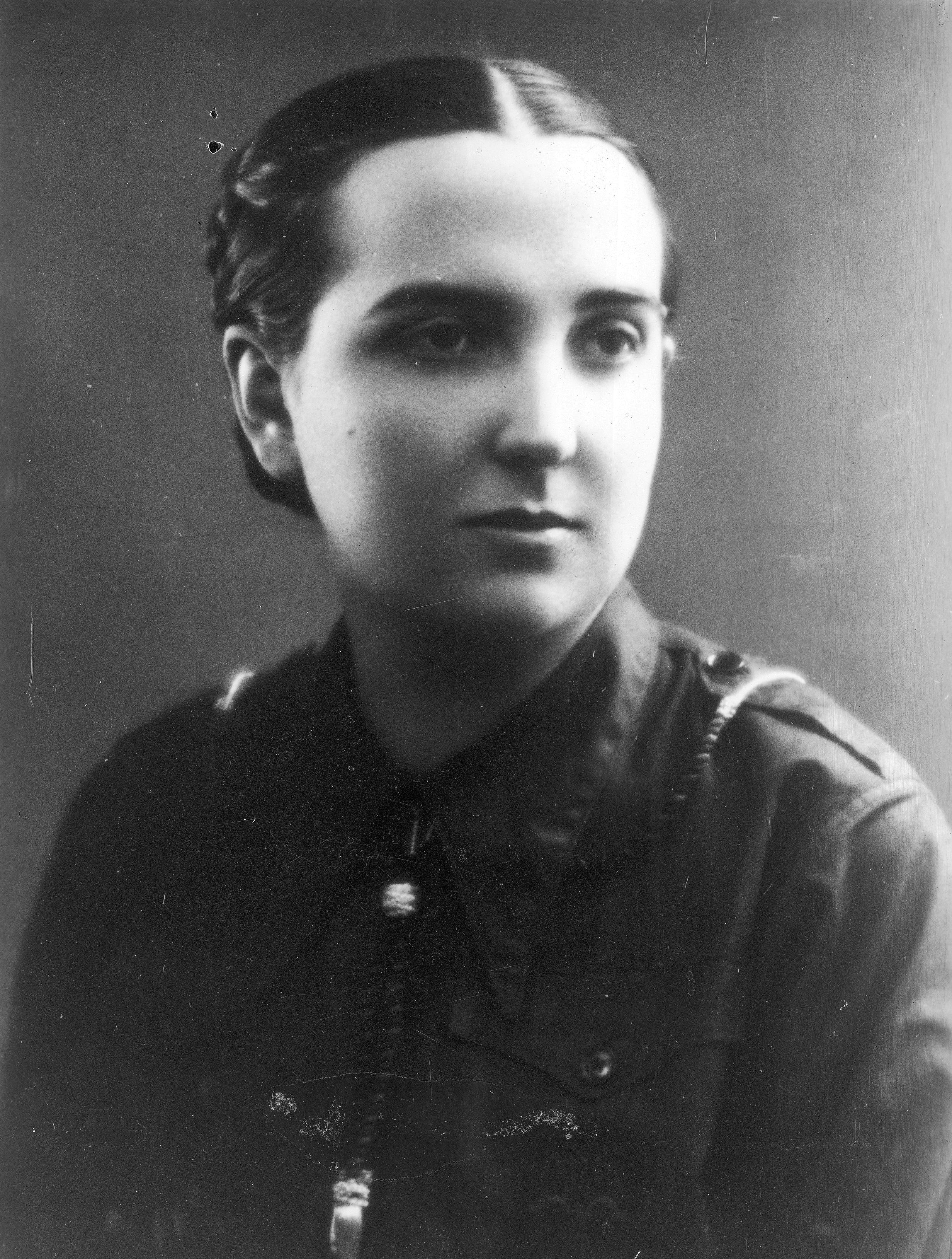 Mercedes Sanz-Bachiller, miembro de la Sección Femenina de Falange y fundadora del Auxilio Social.